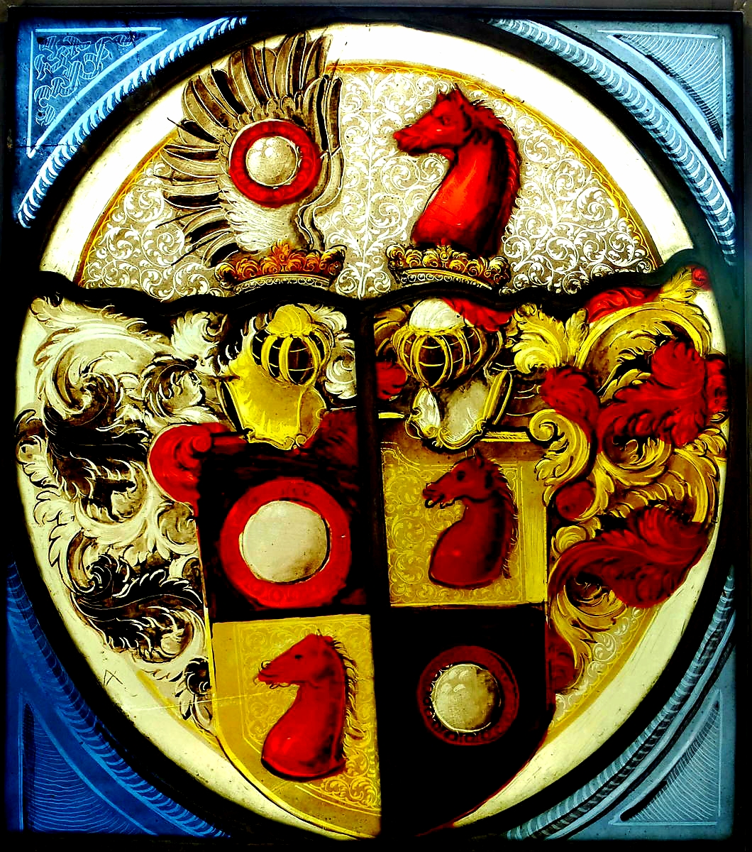 Kabinettscheibe mit dem Wappen derer von Lengheimb zu Pertlstein (Inschrift darunter „Adam von Lennghaimb zu Pertelstain 1582“; Das Wappen aus rotem Überfangglas mit feinem Ausschliff, Schwarzlot, Silbergelb, blaue Zwickel)